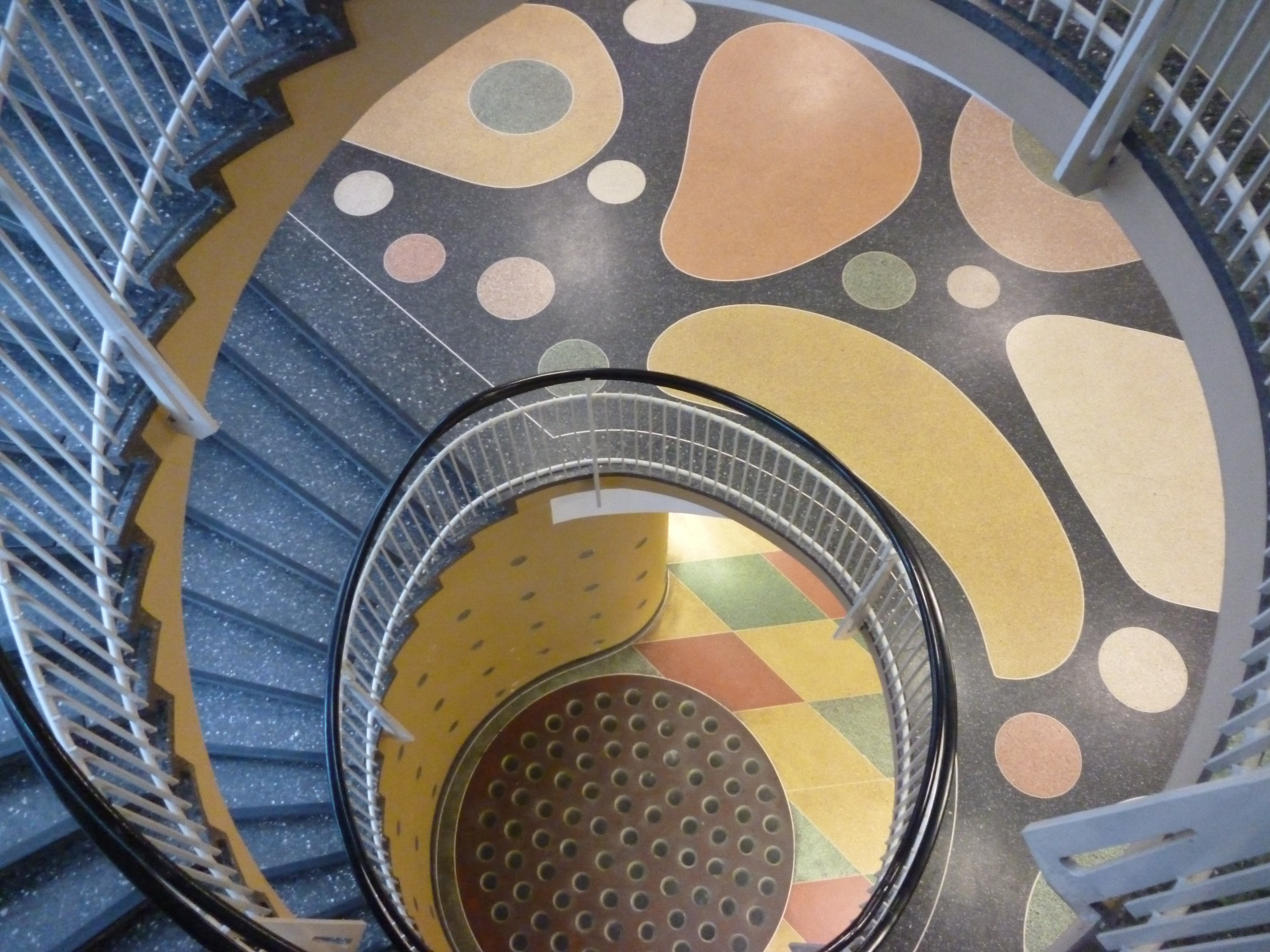 Gesundheitshaus Dortmund Treppenhaus, Blick in EG und UG